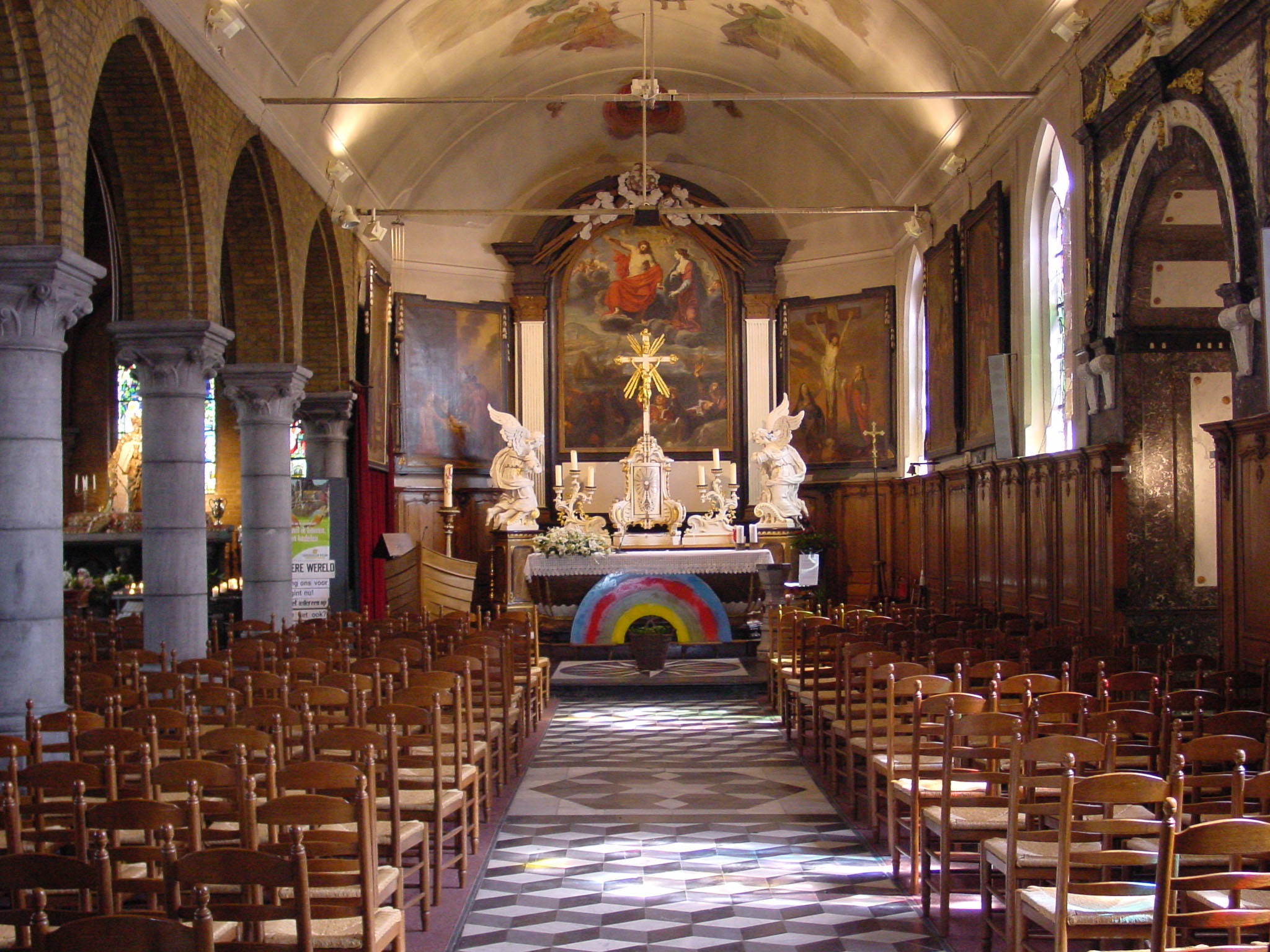 Altar in Onze-Lieve-Vrouw-ter-Duinenkerk , Mariakerke, Oostende Belgium